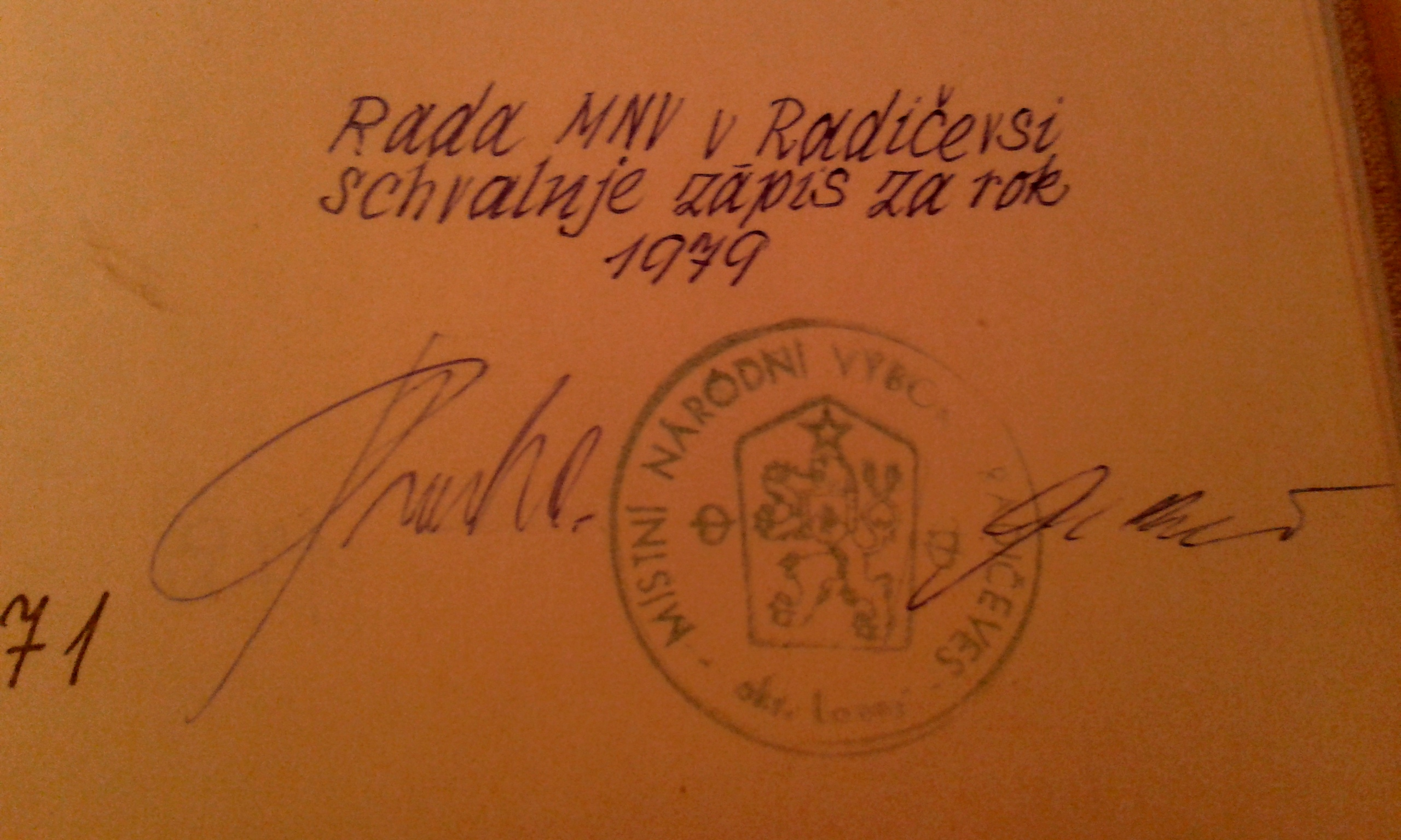 razítko bývalého MNV v Radíčevsi